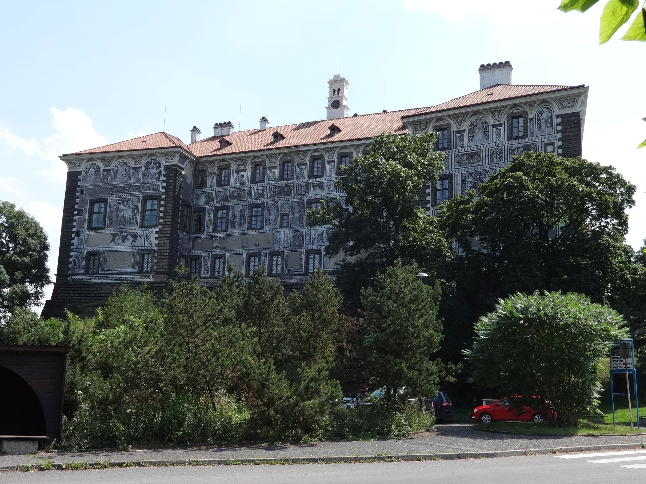 Nordseite